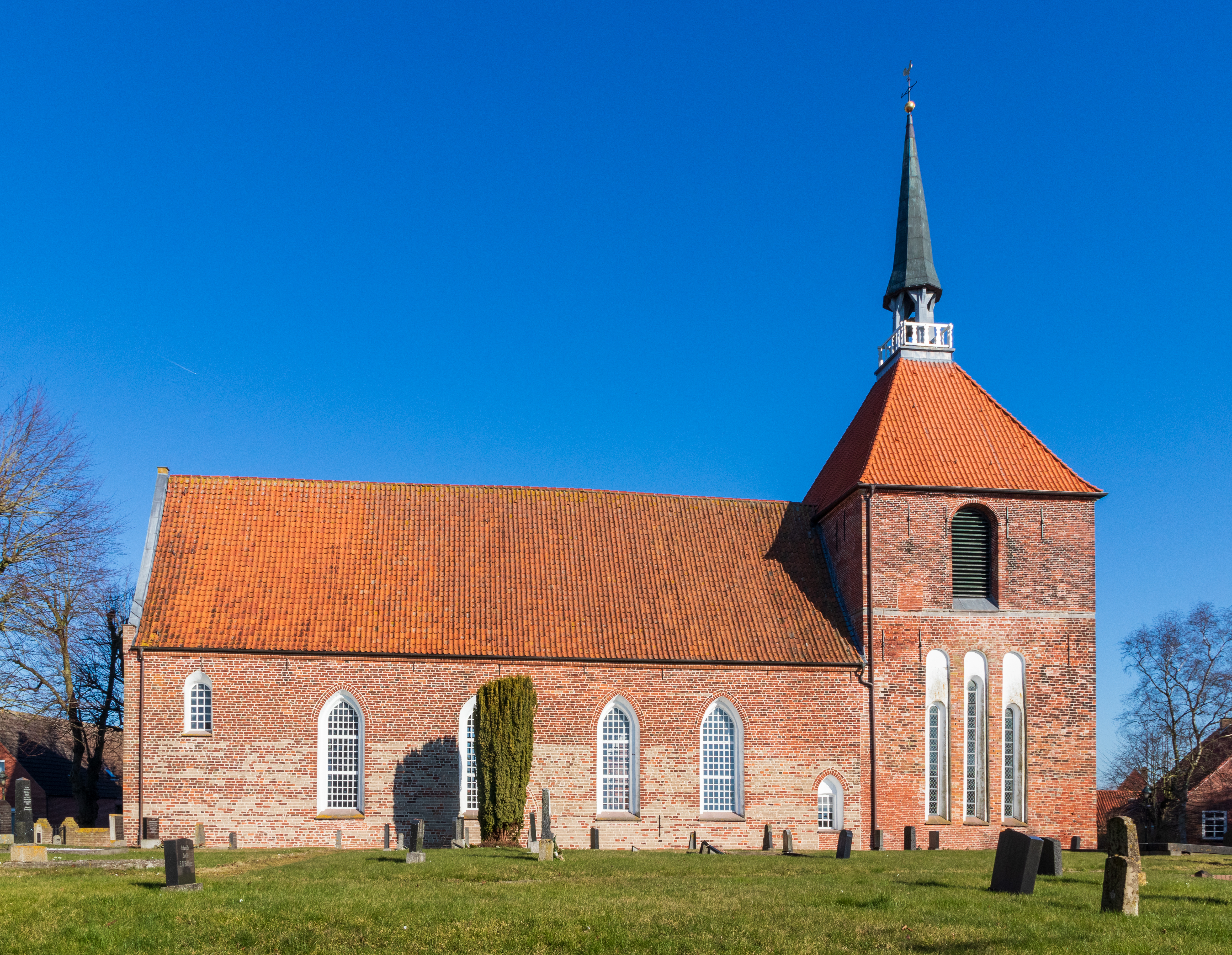 Die Rysumer Kirchen